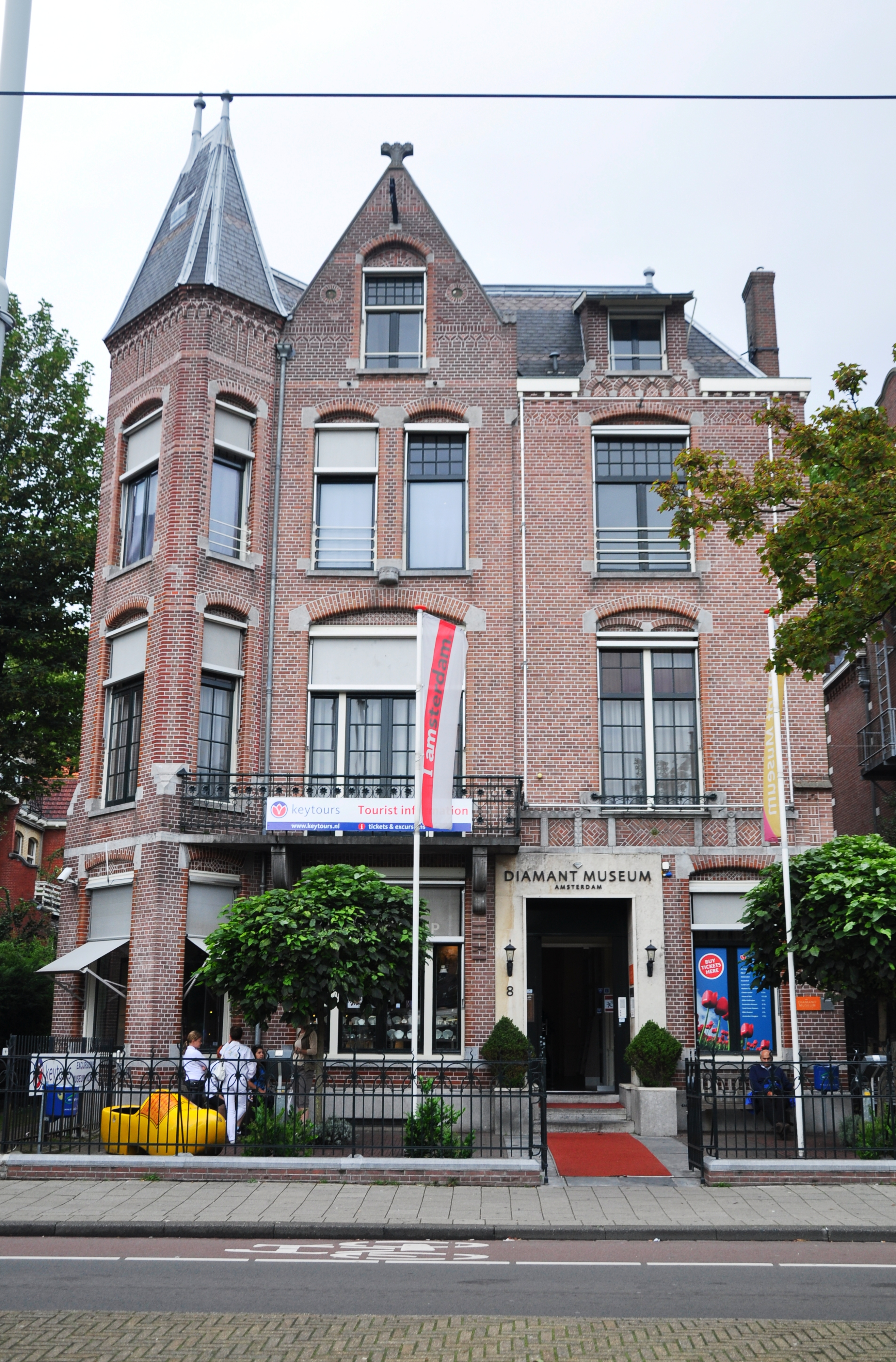 Holland, Amsterdam, Diamant-Museum